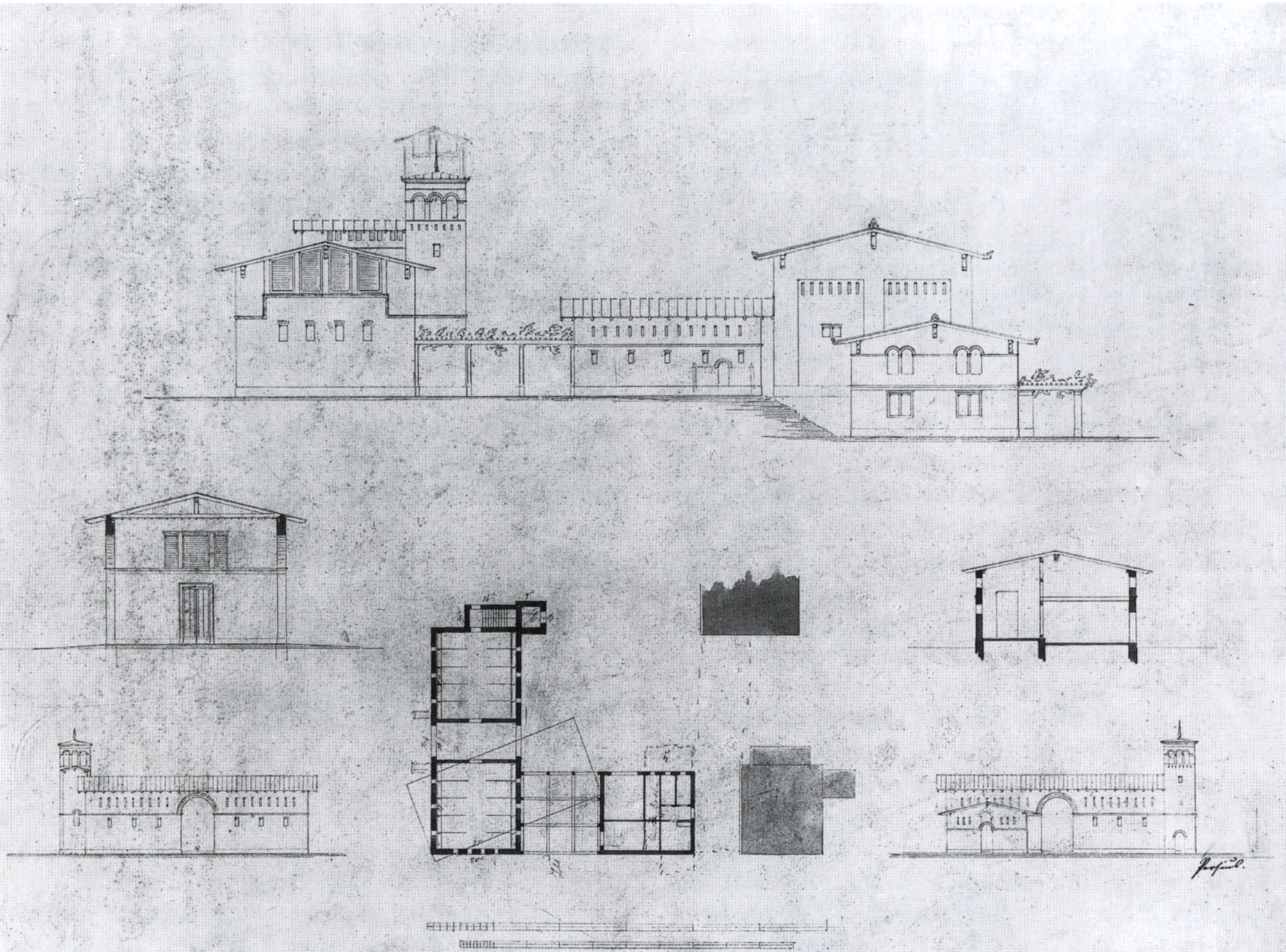 Klein-Glienicke, Wirtschaftshof, Entwurf von Persius 1843/44